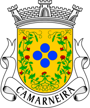 Brasão da Junta de Freguesia da Camarneira